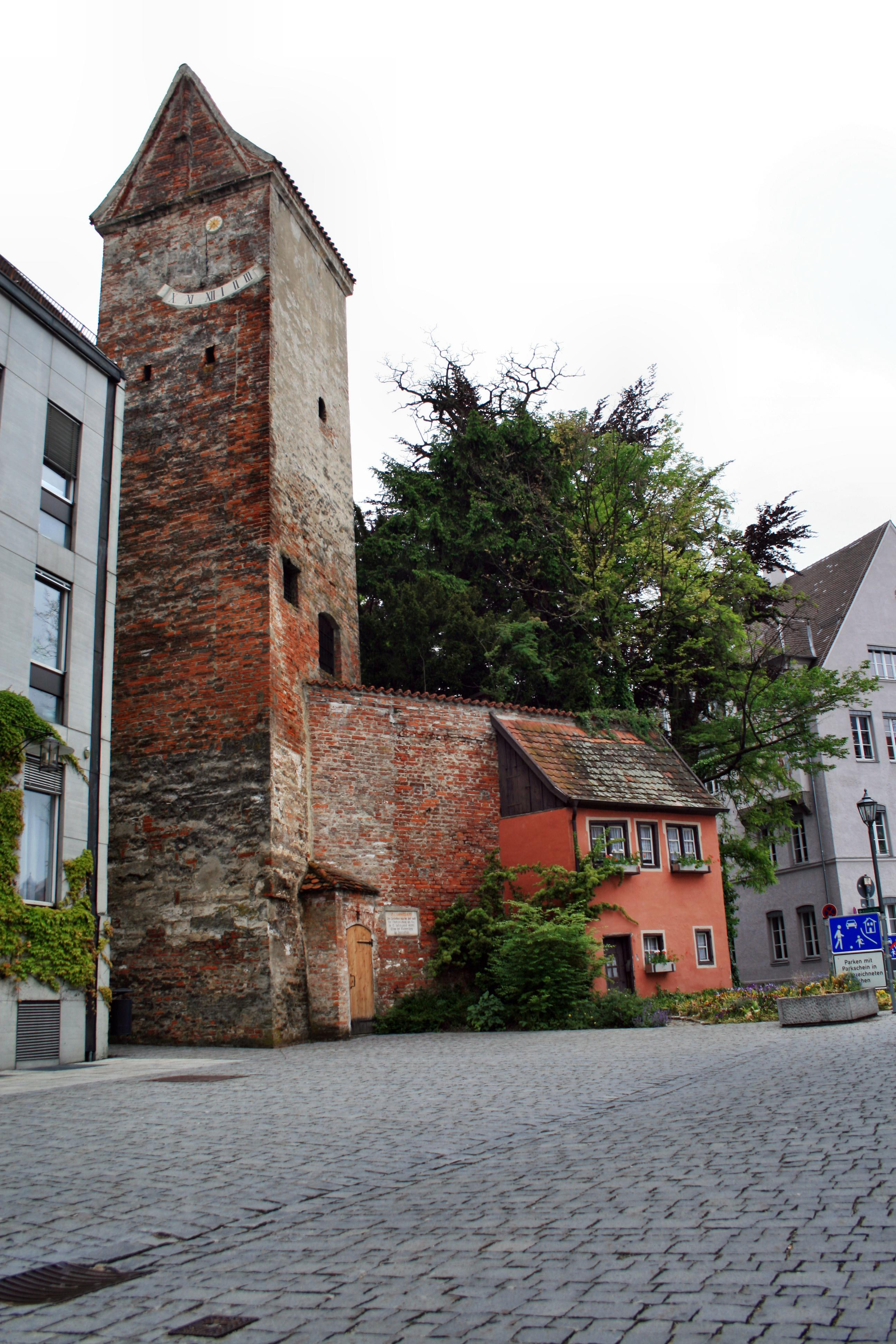 Blick auf den Hexenturm